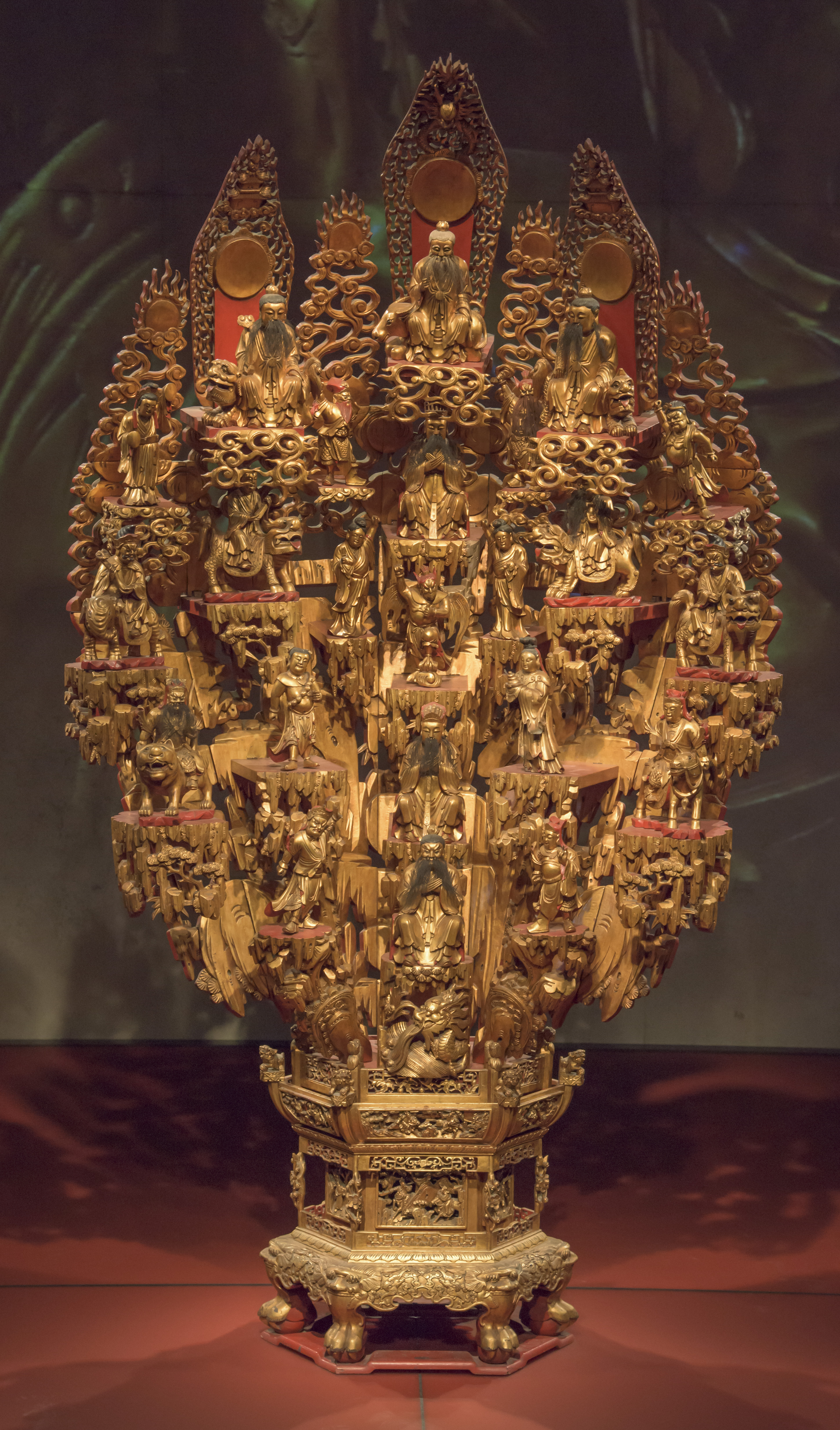 "Berg van Onsterfelijken", Rijksmuseum Volkenkunde, Leiden, NL